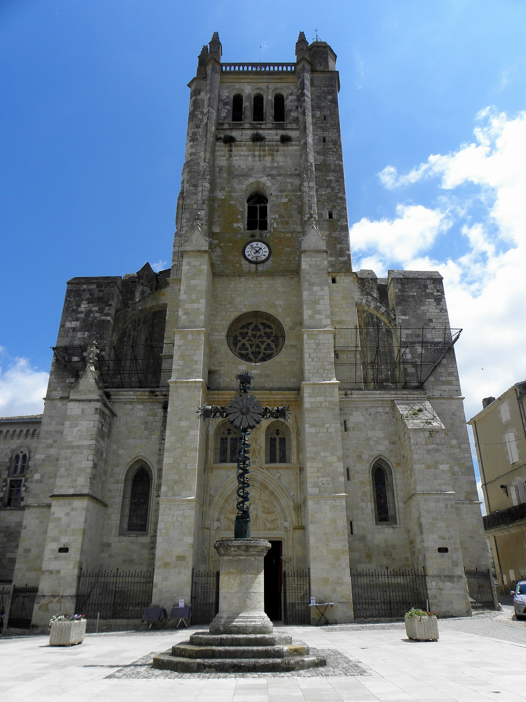 Extérieur de la cathédrale Saint-Pierre de Condom (32).